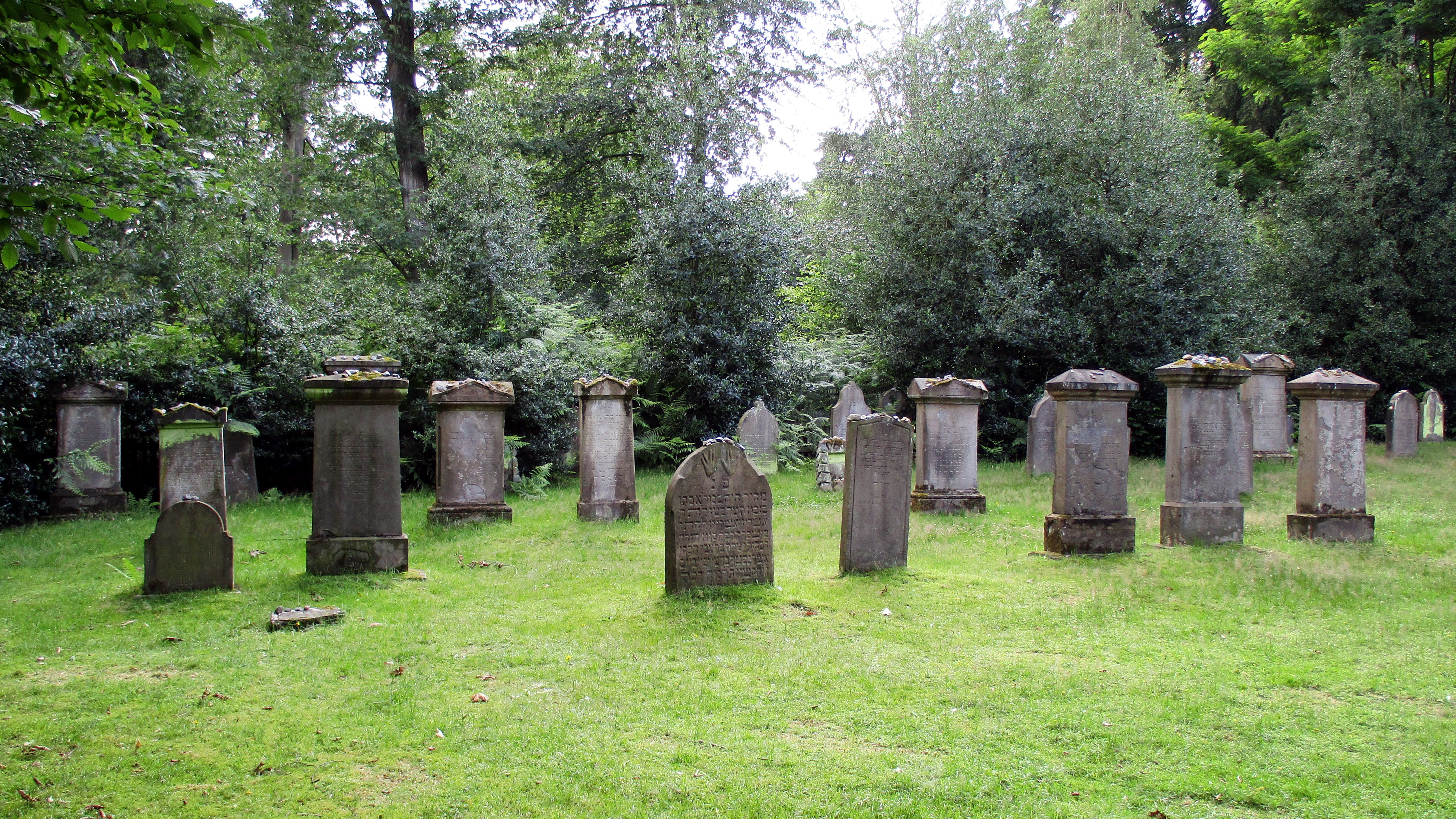 Grabsteine auf dem Alten Jüdischen Friedhof am Blomericher Weg in Ratingen.